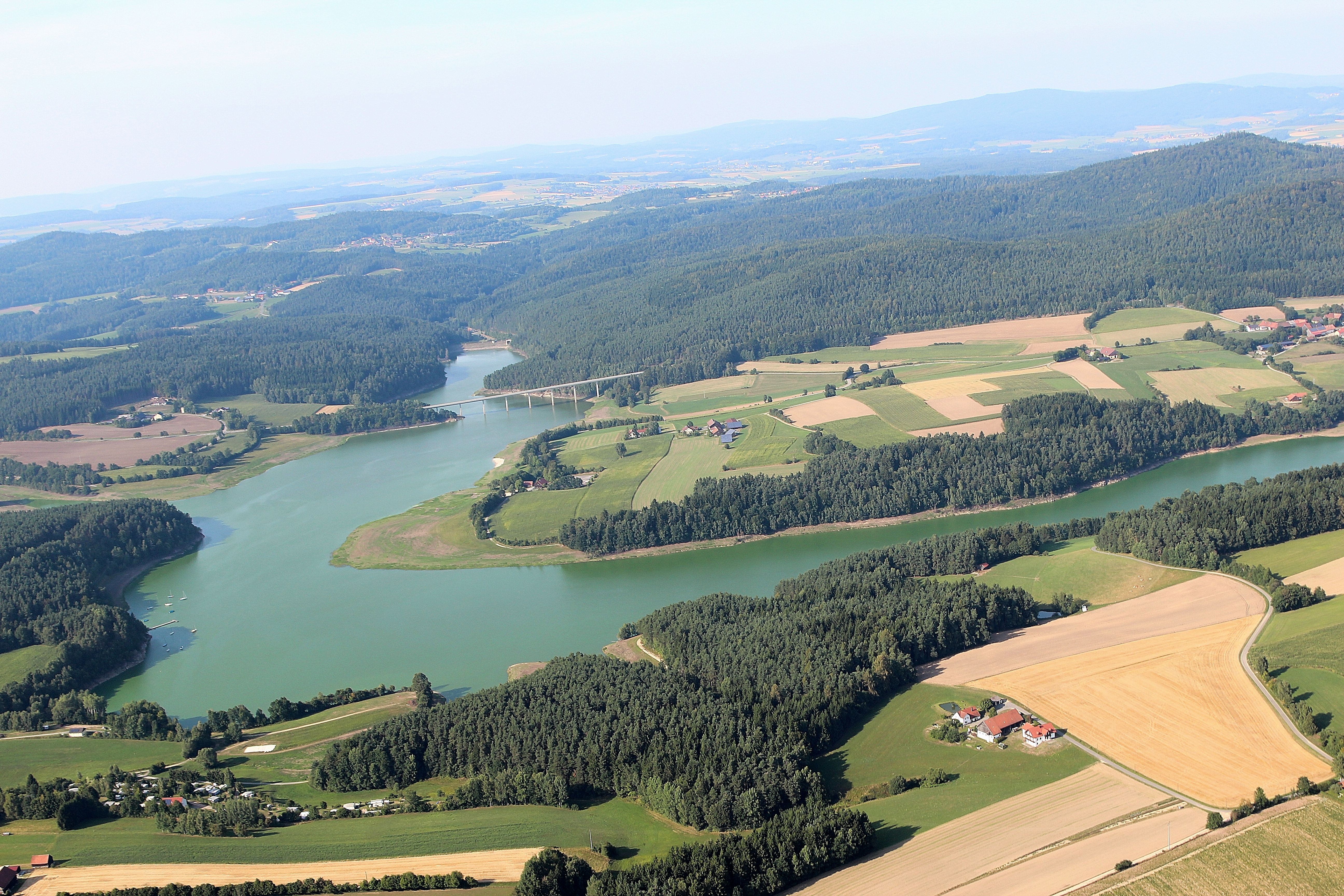 Die Eixendorftalsperre zwischen Rötz und Neunburg vorm Wald ist voller Algen.